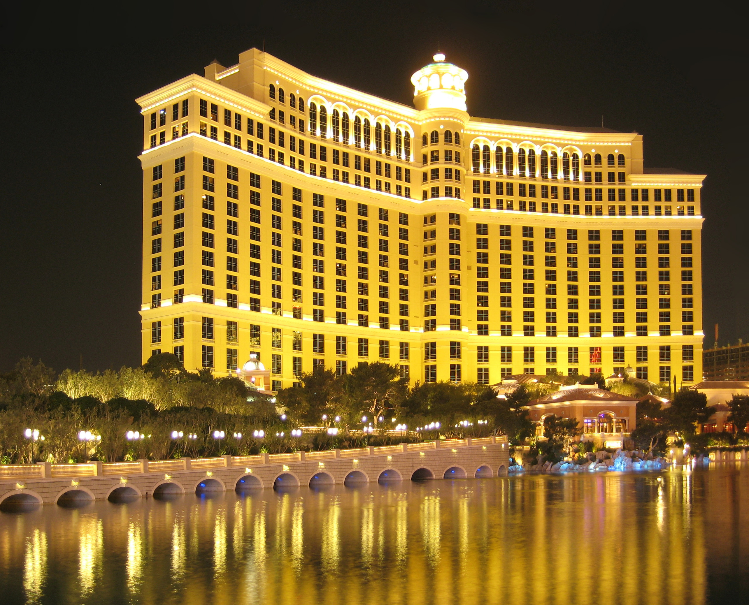 Kasino "Bellagio" am Abend in Las Vegas, NV